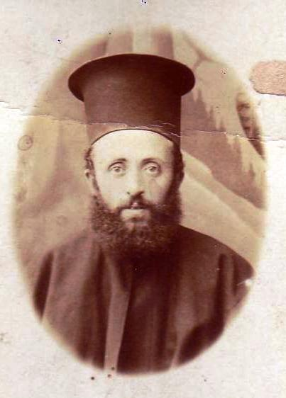 Ο παπα ΣΤΑΥΡΟΣ ΤΣΑΜΗΣ την εποχή της εξέγερσης του ΄Ιλιντεν